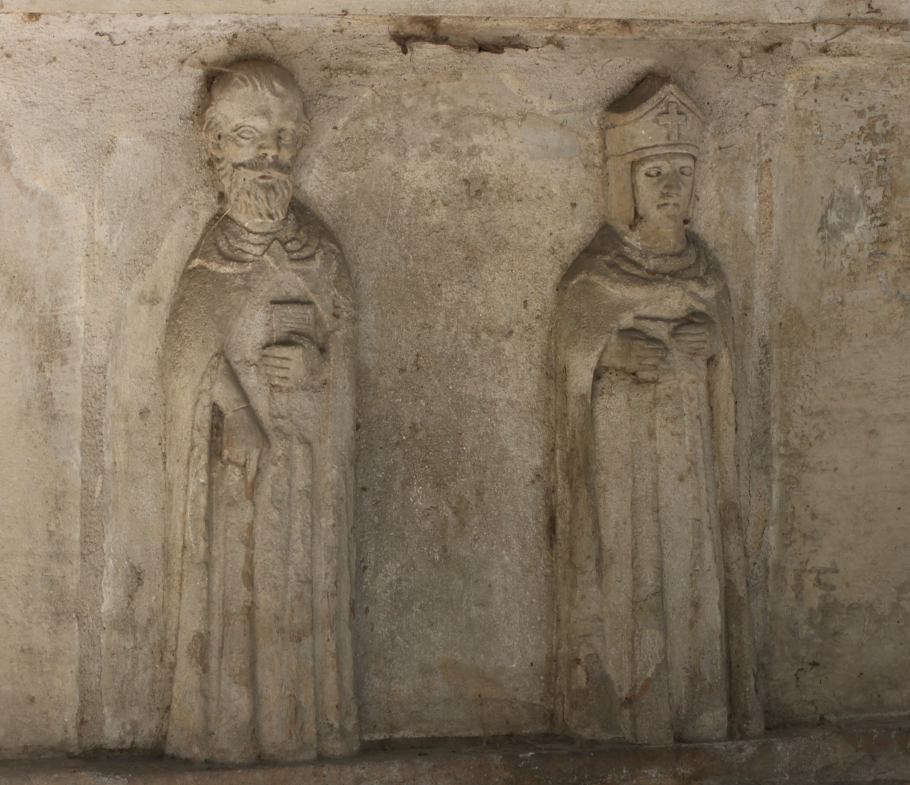 Tombeau de Pierre Abélard (1079-1142) et Héloïse d'Argenteuil (1101–1164) réalisé par Lenoir à partir de fragments de la chapelle de l'abbaye du Paraclet et du tombeau du prieuré Saint-Marcel. La chapelle sépulcrale est ornée de colonnes, d'ogives et d'un clocher percé à jour. Sur le catafalque reposent deux gisants représentant Héloïse et Abélard.